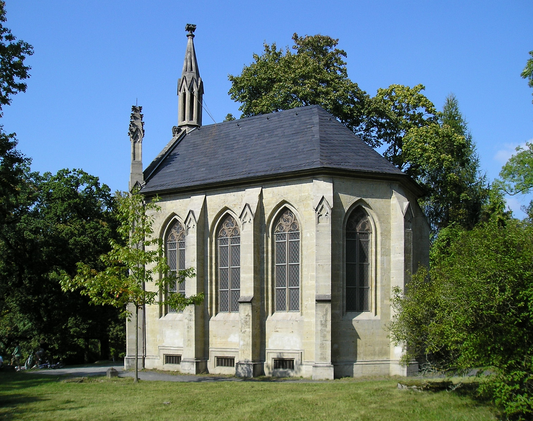 Herzogliche Gruftkapelle in Meiningen